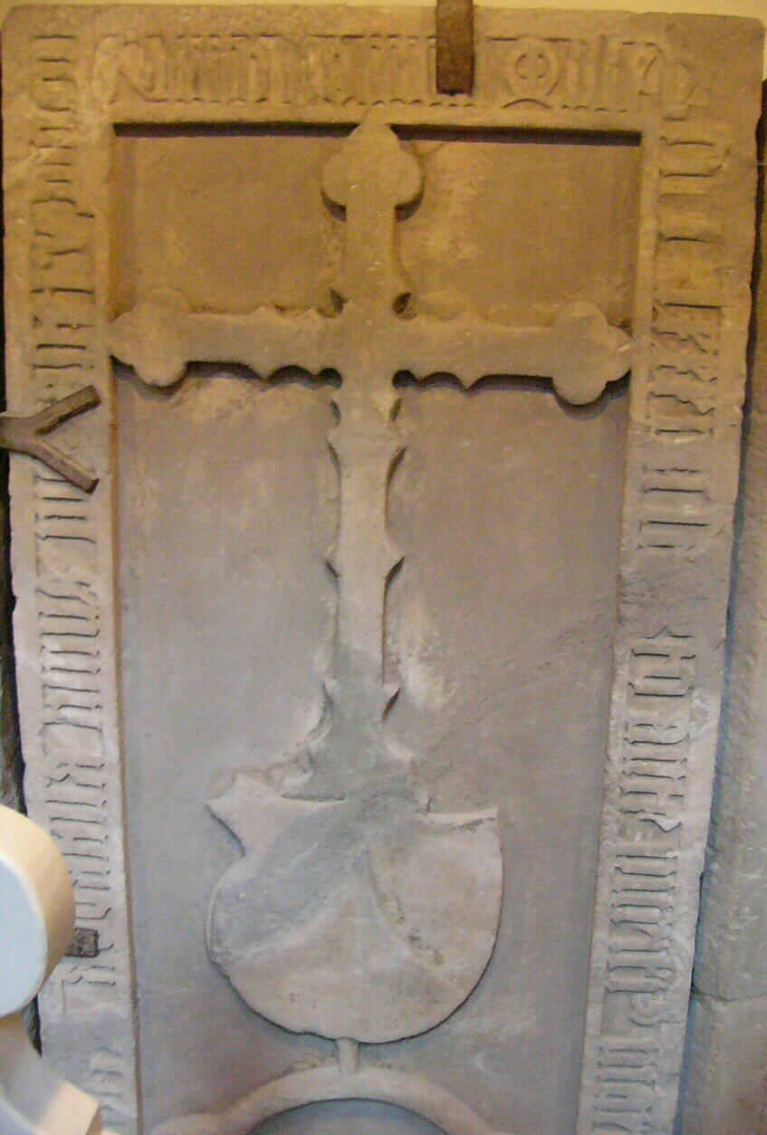 Epitaph der Äbtissin Elisabeth von Künsberg in der Kirche des Klosters Himmelkron